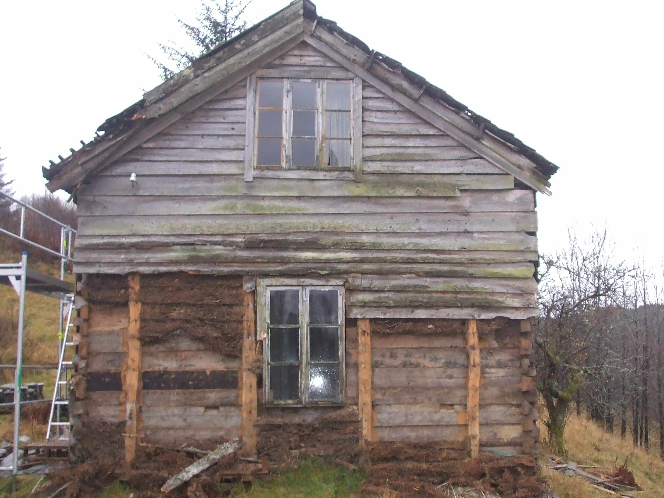 Bygning i klyngetunet Larsbakk i Fjaler, Sogn og Fjordane, mens den ble demontert i Hyllestad